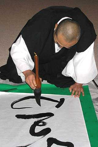 Hitsuzendô, Sasaki Gensô Rôshi